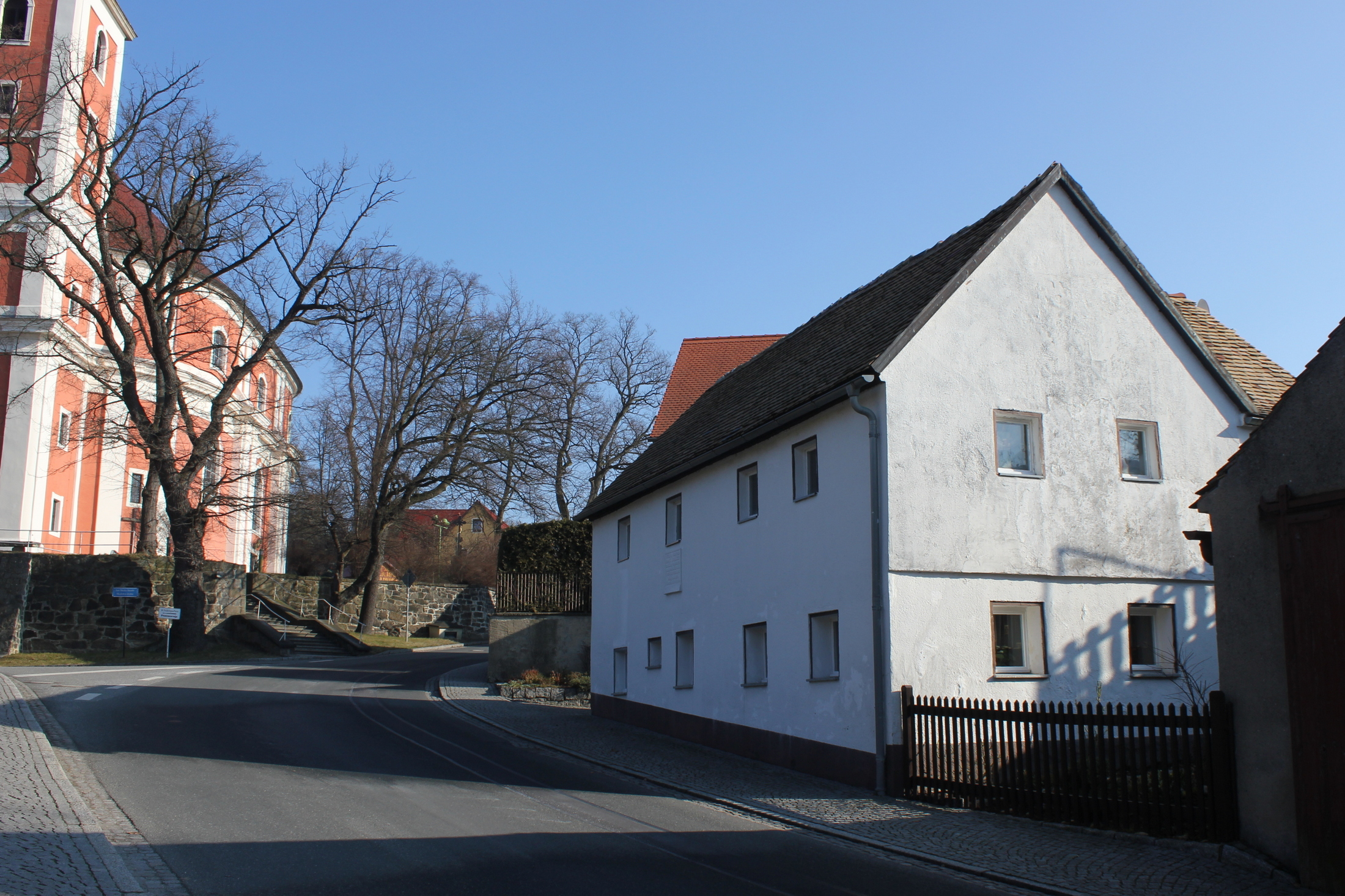 Hornjoserbsce: Njebjelčicy; ródny dom Jana Skale při Hłownej.